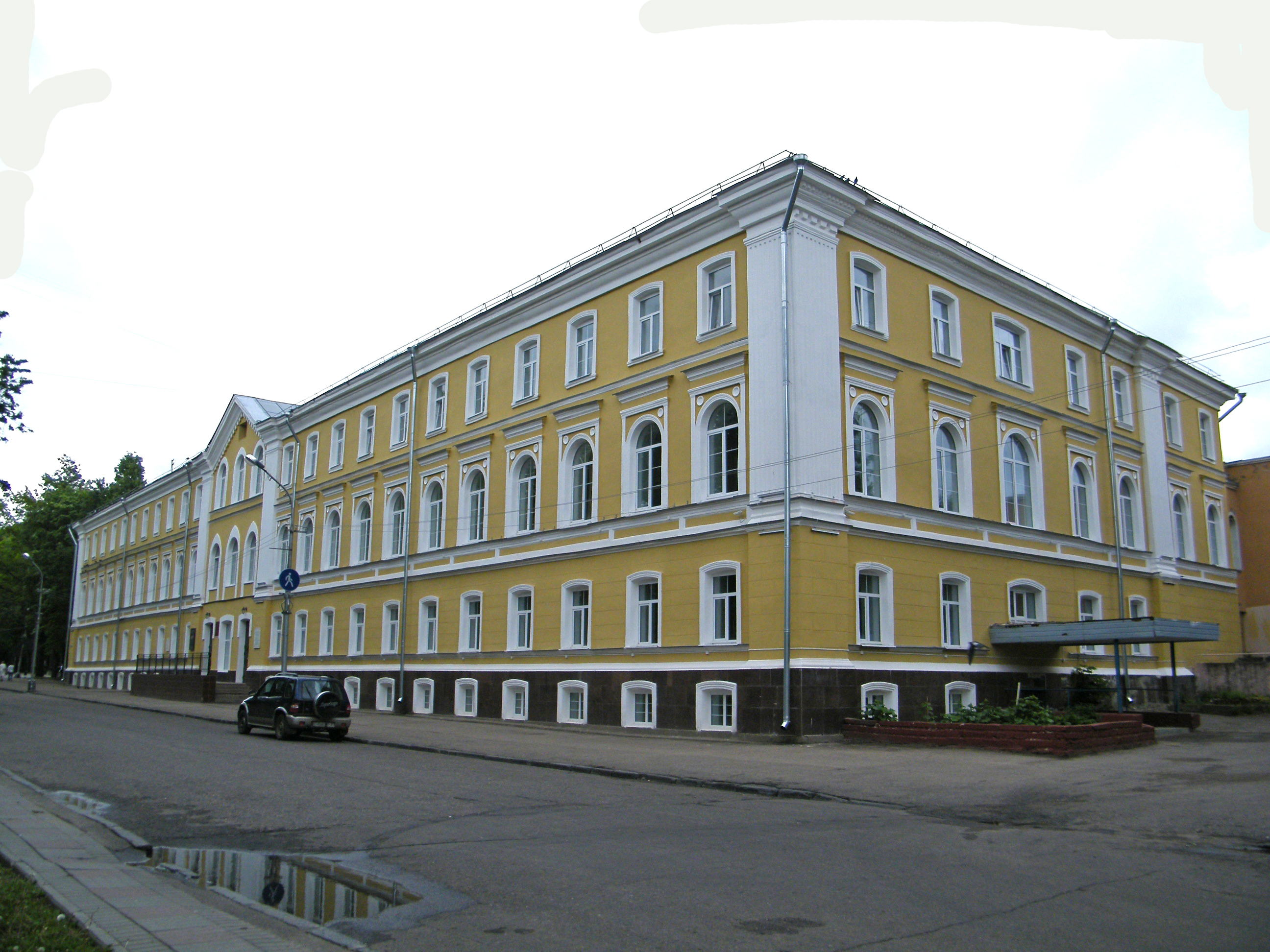 Гимназия